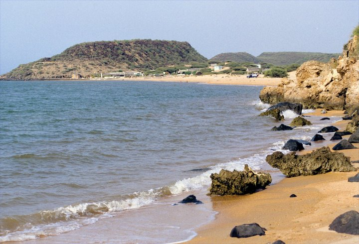 Strand von Khor Ambado